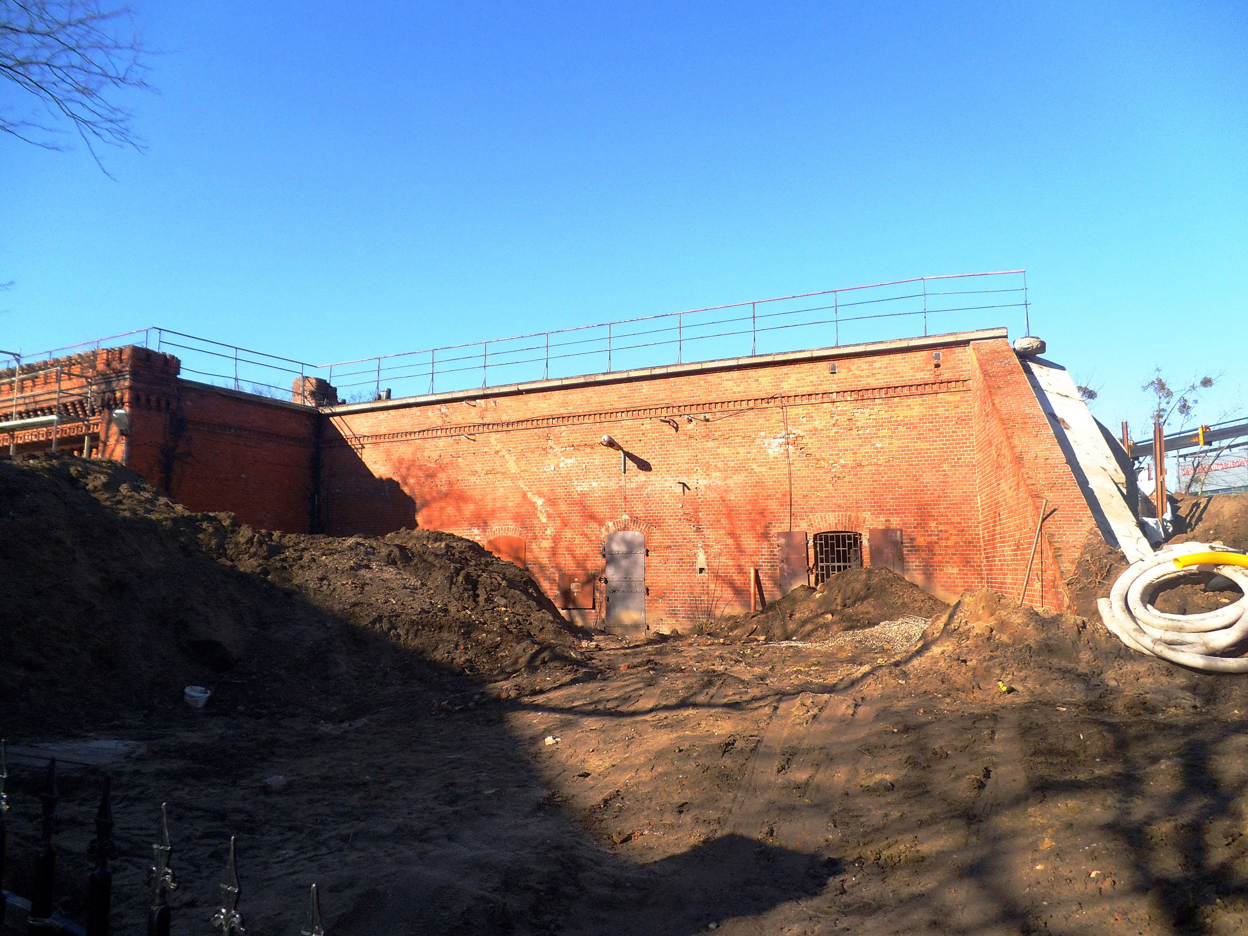 Koszary Bramy Chełmińskiej w Toruniu